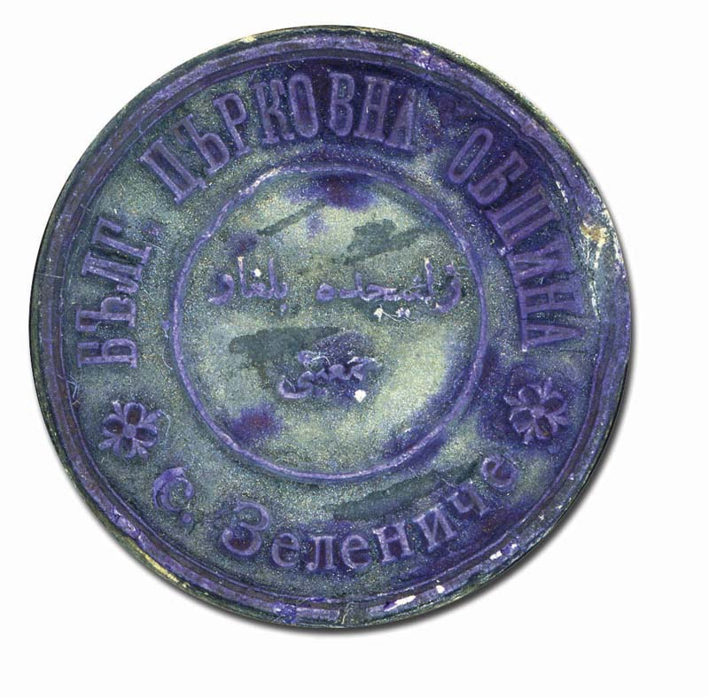 Отпечатък от печат на българската община в Зелениче, днес Склитро, Гърция.